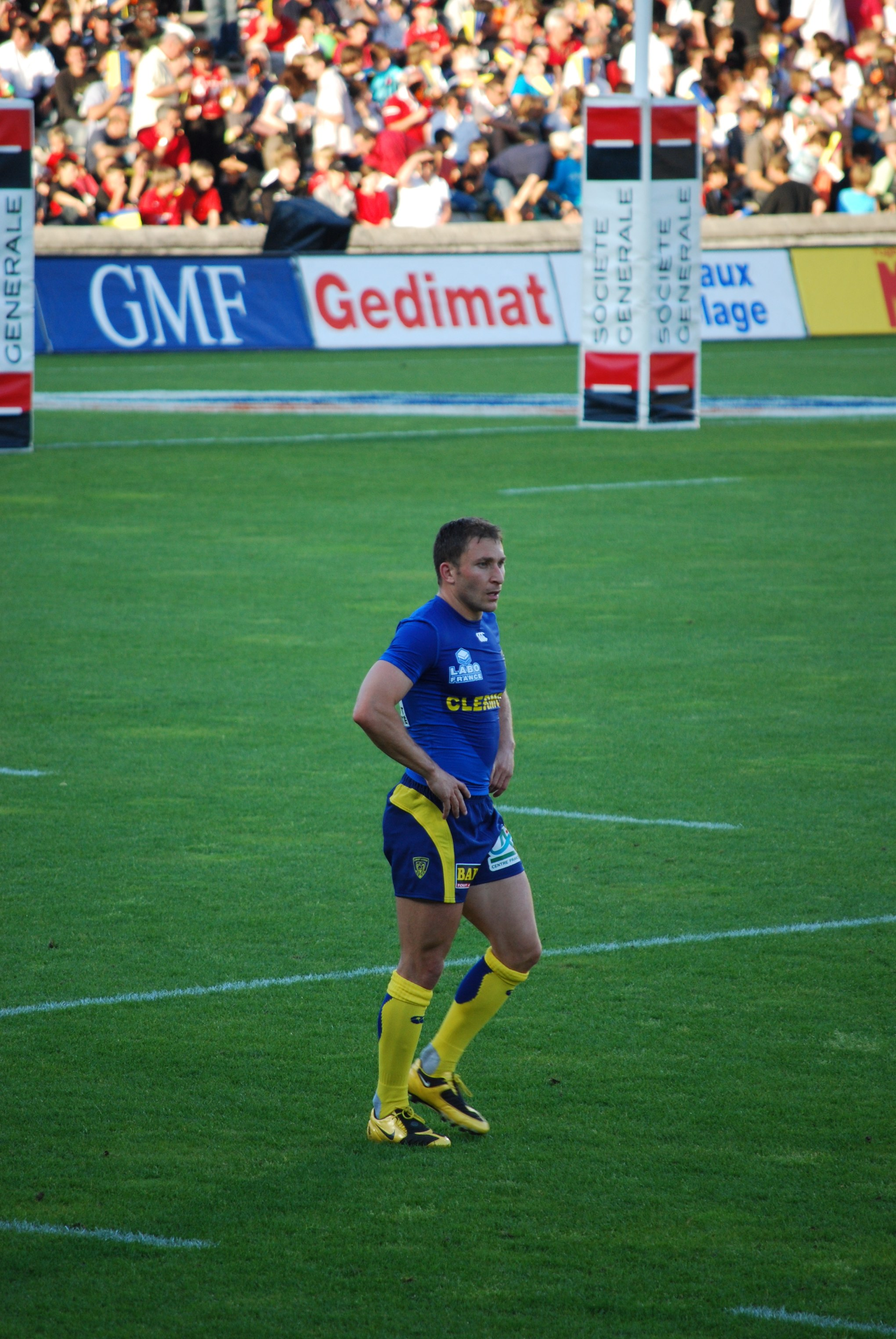 Pierre Mignoni lors de la demi-finale de top 14 2008-2009 opposant Clermont à Toulouse